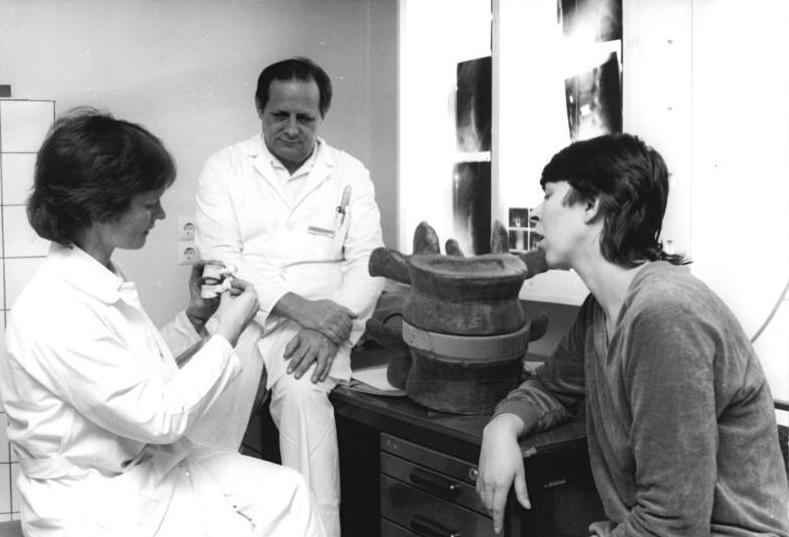 ADN-ZB-Junge-22.2.1986-erd-Berlin: Entwicklungskollektiv der künstlichen Bandscheibe- Medizinalat Oberarzt Dozent Dr. sa. med. Kurt Schellnack und Stationsärztin Dr. med. Karin Büttner-Janz (links, Fachärztin für Orthopädie, ehemalige Weltklasseturnerin) von der Orthopädischen Klinik des Bereiches Medizin (Charité) der Humboldt-Universität entwickelten die Bandscheibenendoprothes Modulartyp SB Charité, die seit September 1984 zum Einsatz kommt. Hier sind beide im Gespräch mit der Patientin A. L.[*] vor der Implantation zweier künstlicher Bandscheiben. Das große Modell auf dem Tisch zeigt eine Bandscheibe, die zwischen zwei Wirbelkörpern liegt. Die 27jährige Berlinerin A. L. ist von Beruf Verkäuferin und hat als Dispatcher für Industriewaren gearbeitet. Information added by Wikimedia users.[*] Real name of patient removed due to personality rights